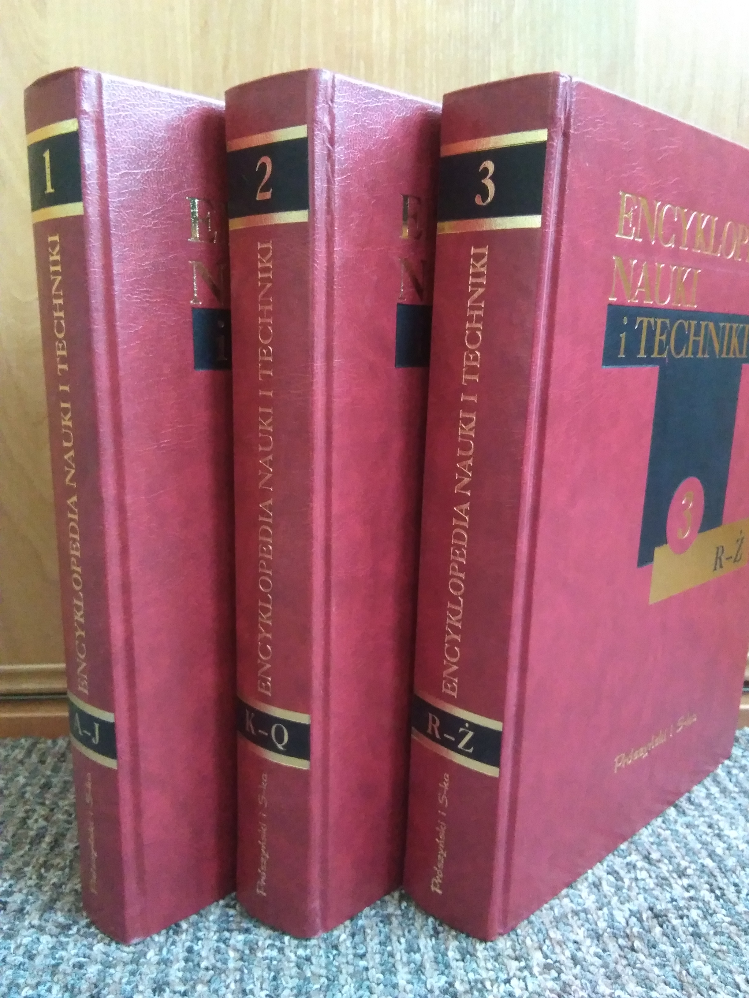 3 tomowa Encyklopedia Nauki i Techniki.